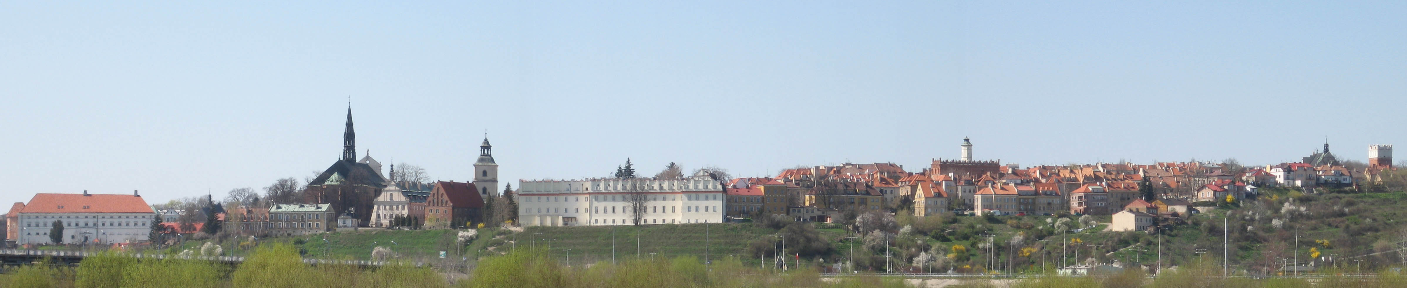 (pl) Panorama Sandomierza, kwiecień 2007. Od lewej widoczne: Zamek, Kościół św. Jakuba, Katedra, Dom Długosza, Collegium Gostomianum, Kamieniczki wokół Rynku, wśród nich Ratusz, Kościół św. Ducha, Brama Opatowska. (en) Panorama of the beautiful city of Sandomierz. Taken by me in April 2007. From left to right: The Castle, Church of St. James, Cathedral, Jan Długosz's House, Collegium Gostomianum, Town Hall & old houses around the Market Square, Church of Holy Spirit, Opatowska Gate.